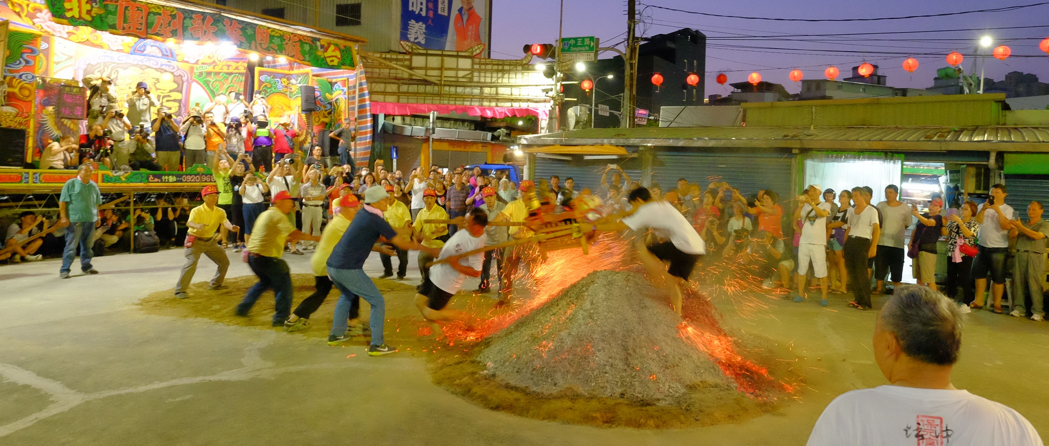 中文（台灣）: 2019年 新莊保元宮 弄過火